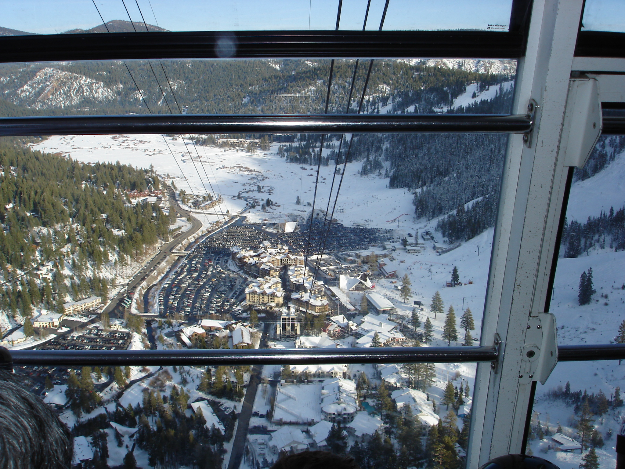 Поглед надолу от кабинков лифт към главната плаца в Ски Курорт Скуо Вали, Калифорния.